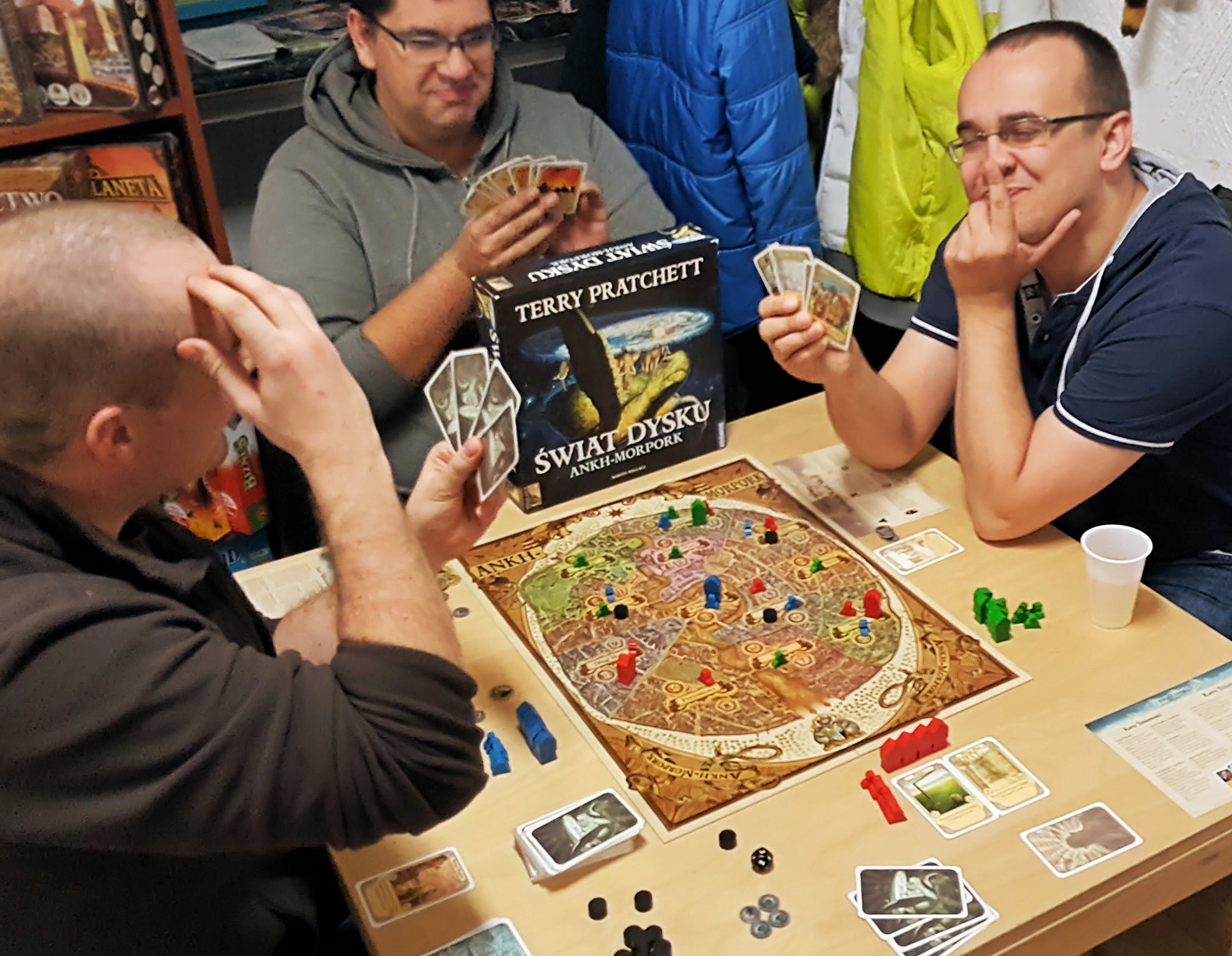 Gra planszowa Discworld Ankh-Morpork - przykładowa rozgrywka.